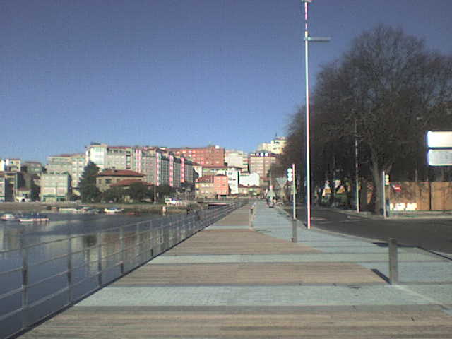 Paseo marítimo, la capital recupera su horizonte marítimo